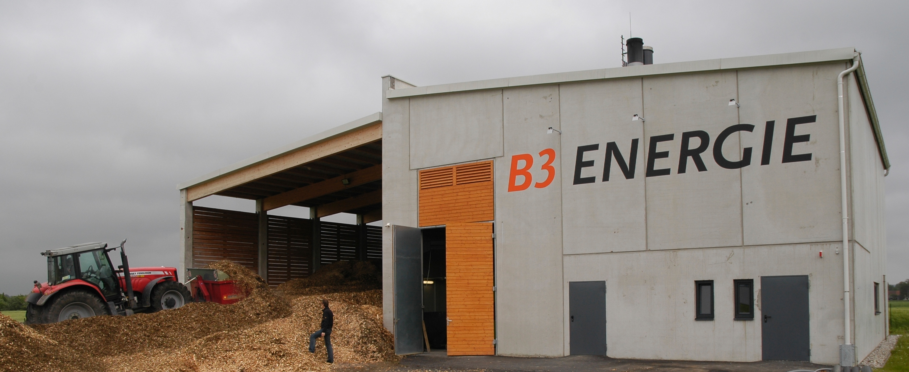 Biomasseheizwerk der B3 Energie für die Wärmeversorgung von Mauthausen mit einer thermischen Biomassewärmeleistung von 2 MW und einer Heizöl Ausfalls- und Spitzenlastreserve von 3 MW